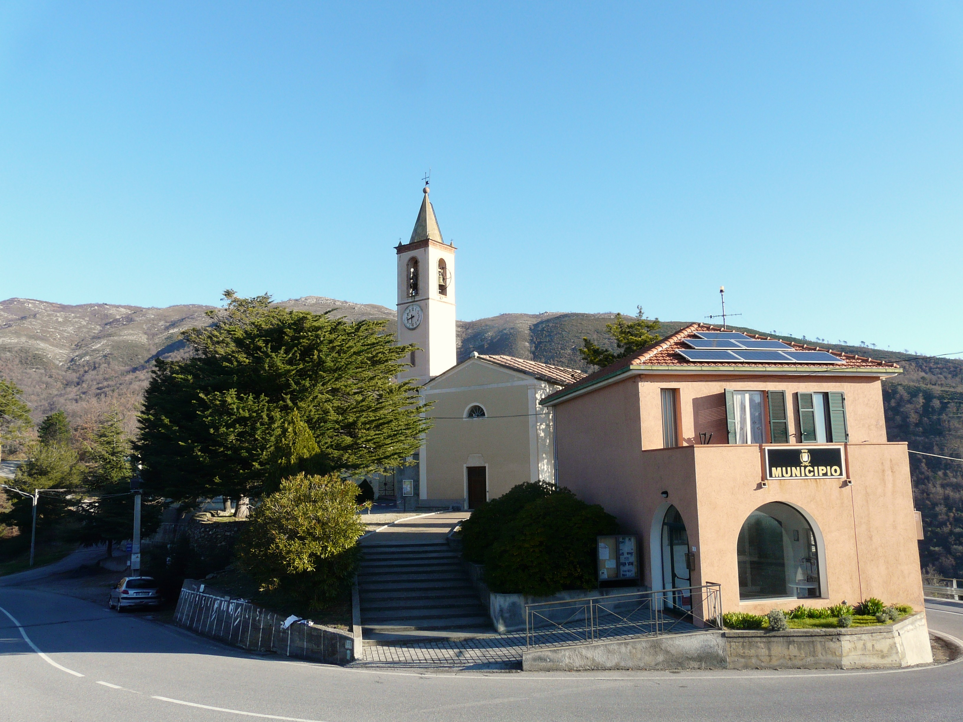 Vendone, Liguria, Italia